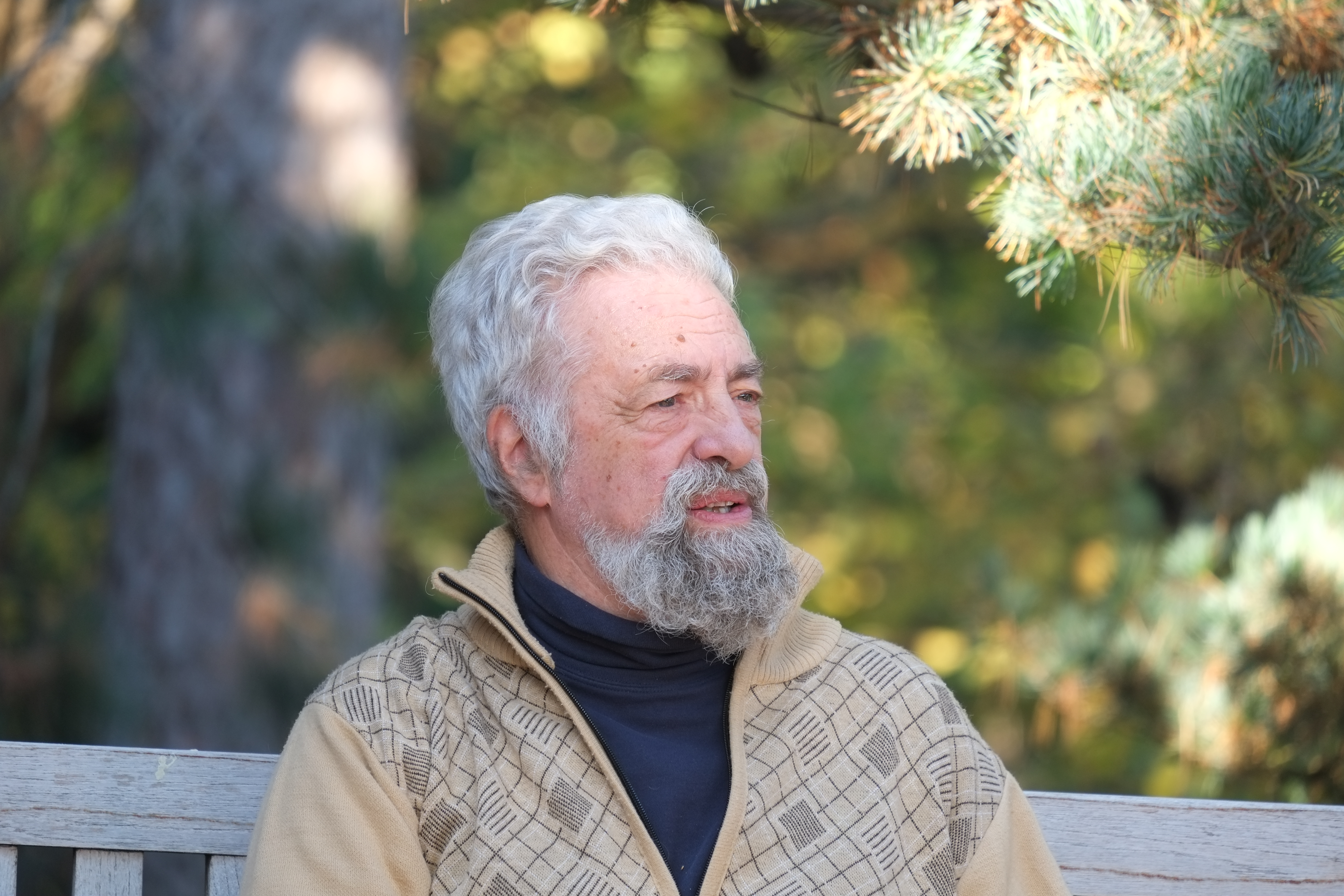 Юлий Сергеевич Ильяшенко, 2013 год, Корнельский университет